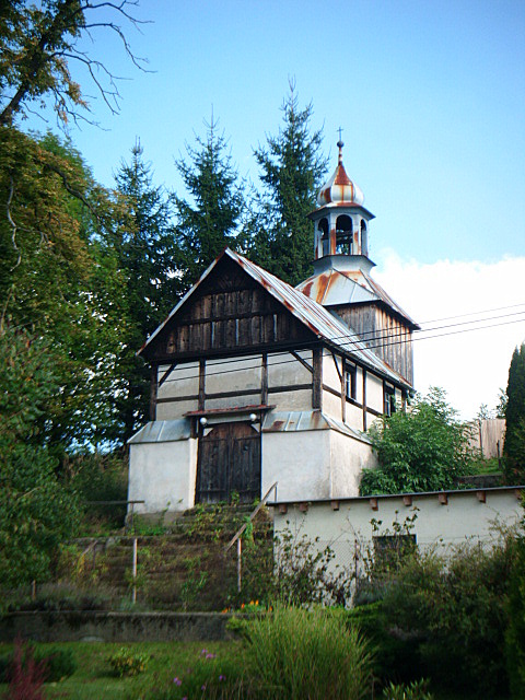 Kaple se zvonicí (Dobrná), Dobrná